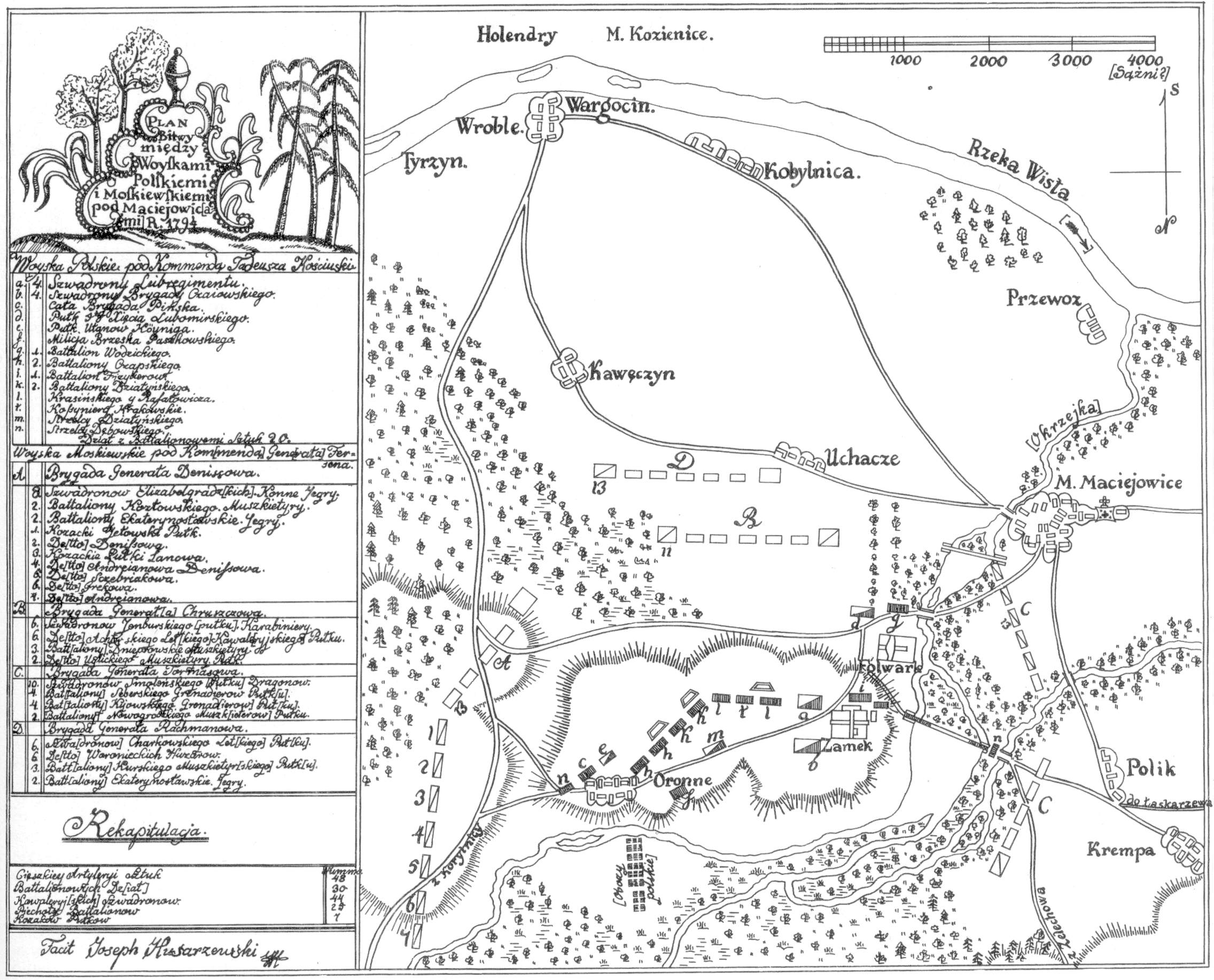 Bitwa pod Maciejowicami